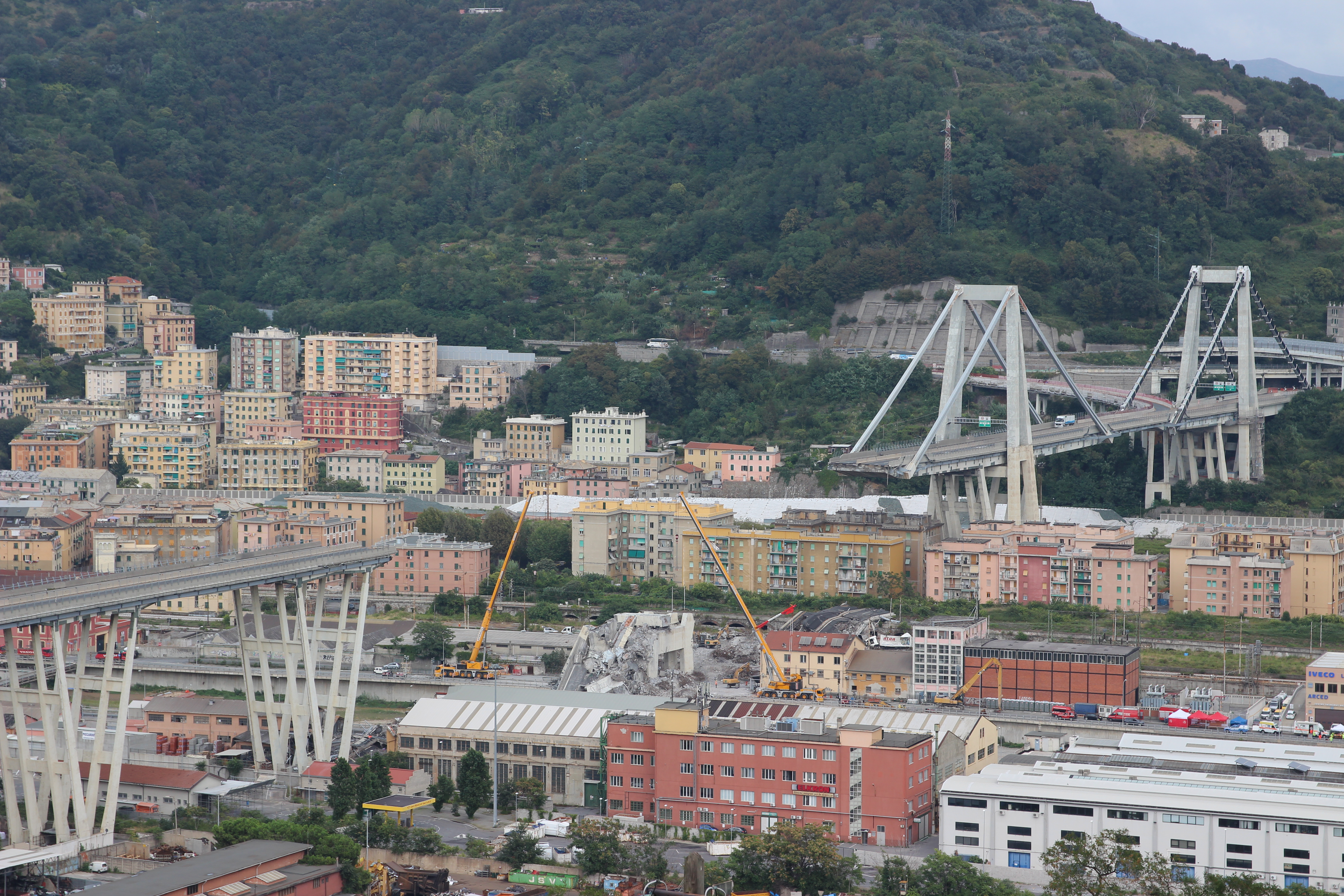 Immagine del Ponte Morandi, dopo il crollo avvenuto il 14 agosto 2018.